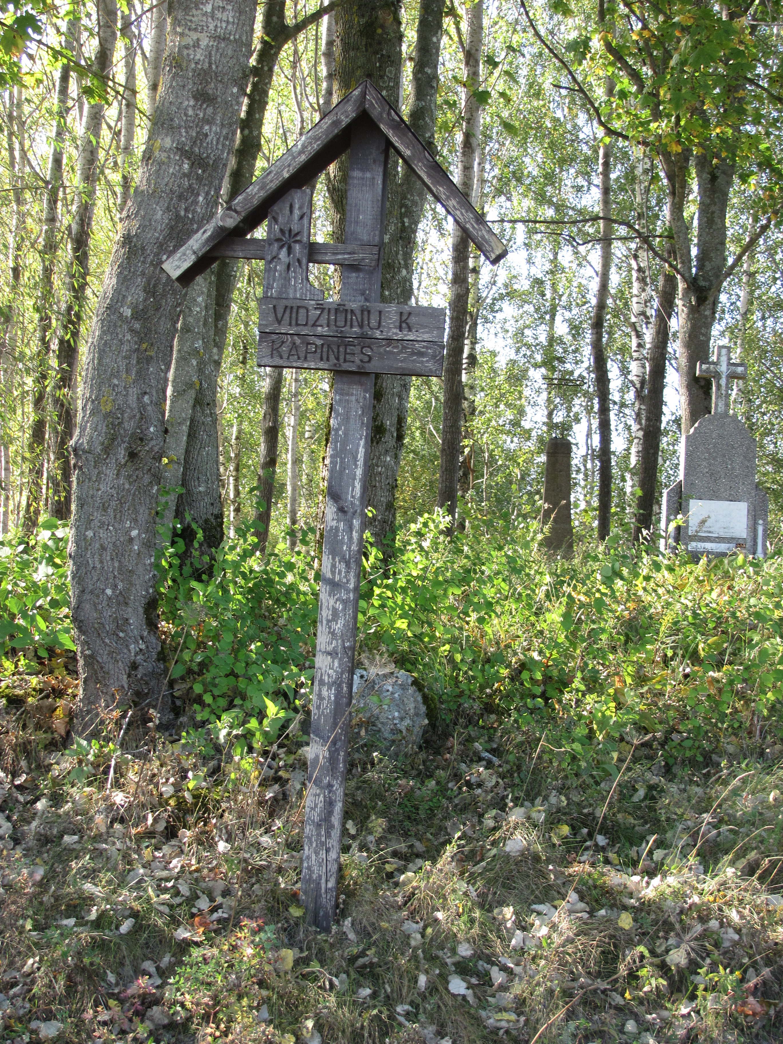 Tauragnų sen., Lithuania